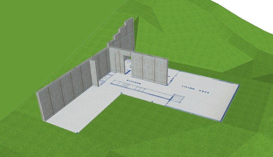 infographie démontrant le parti-pris de Pierre Koenig